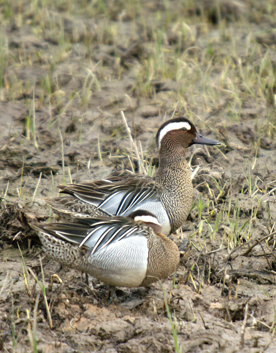 Cerceta carretona - Garganey Anas querquedula, males. Llobregat Delta, Barcelona, Spain